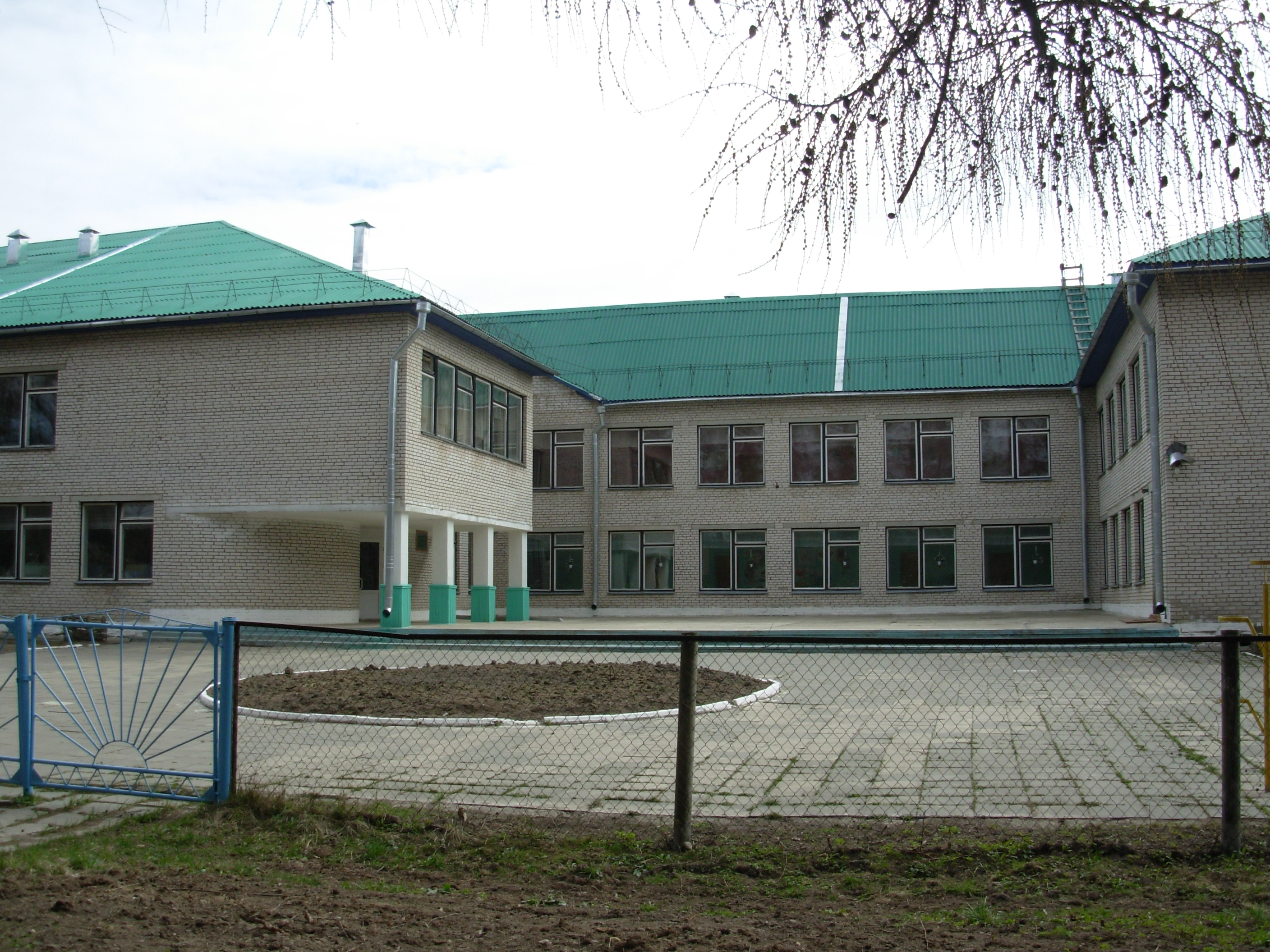 Беларуская (тарашкевіца): Вусьцянская школа